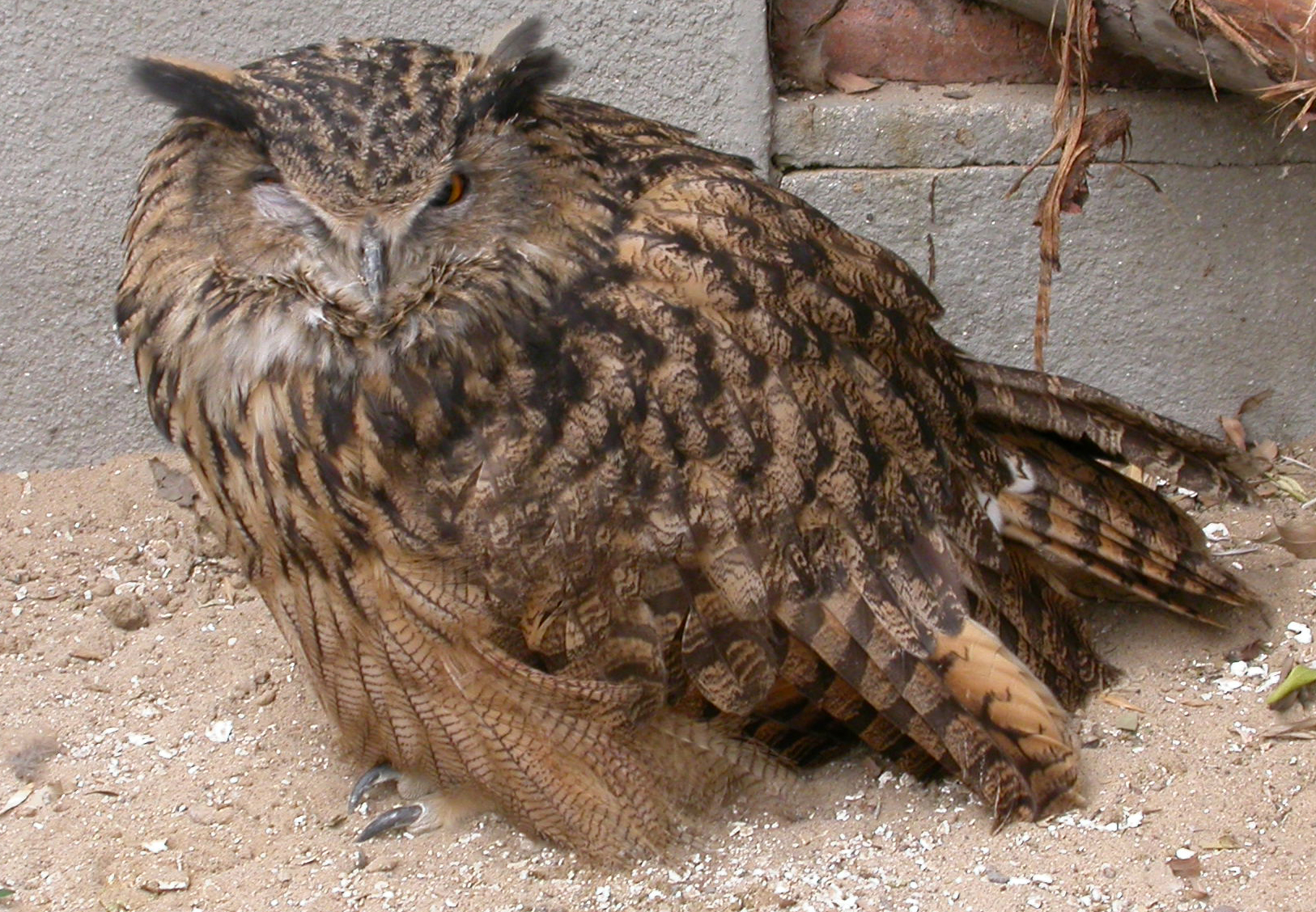 雕鸮，摄于北京动物园，自己拍，本图片不允许百度百科使用